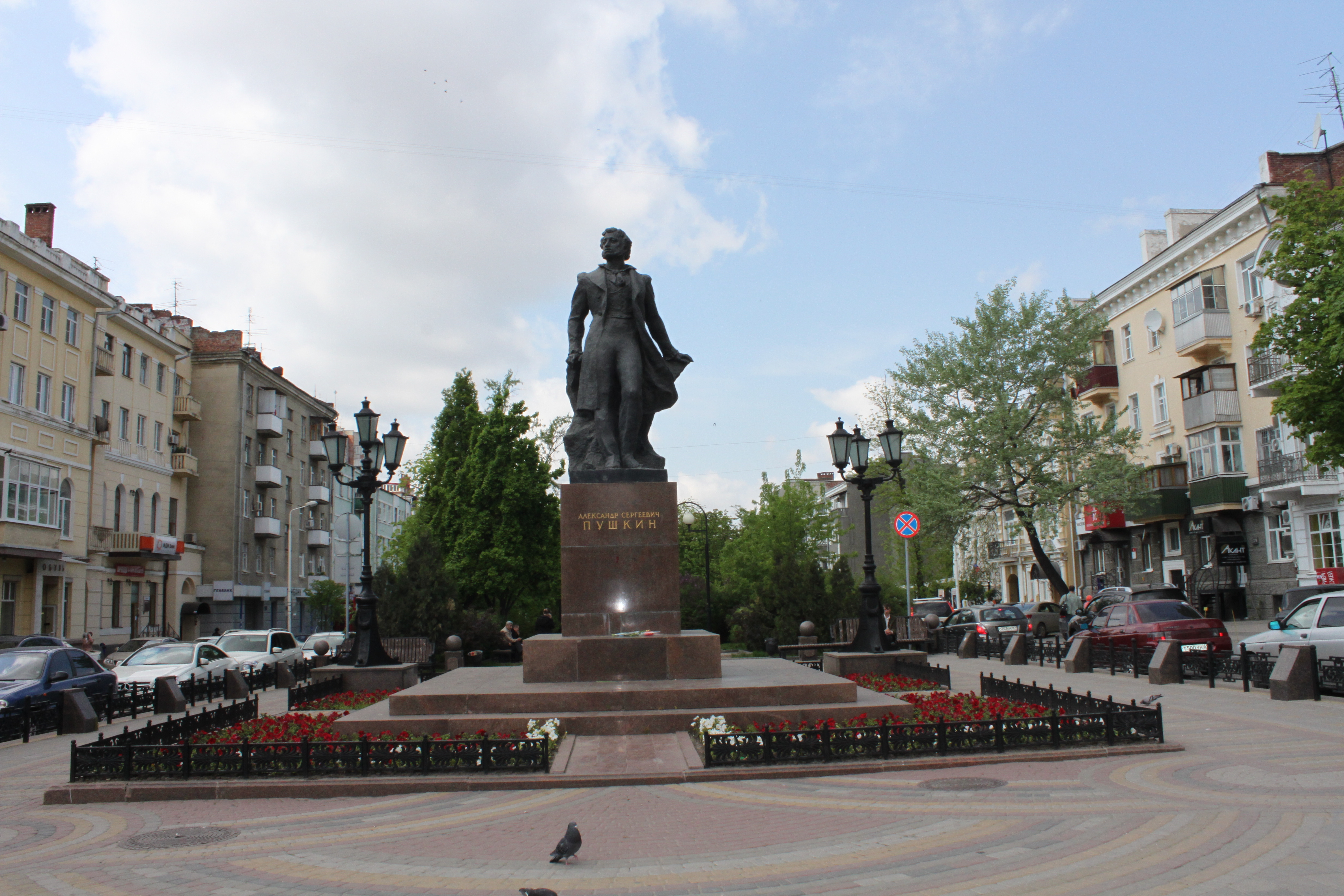 Kirovskiy rayon, Rostov, Rostovskaya oblast', Russia